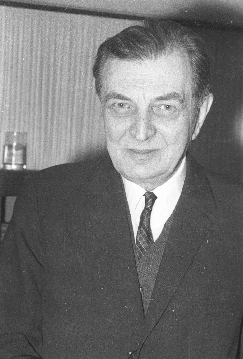 Pianist und Komponist aus Russland. Sein Ballett "Der fahrende Schüler mit dem Teufelbannen" feiert am 12.01.1965 Premiere am Stadttheater.